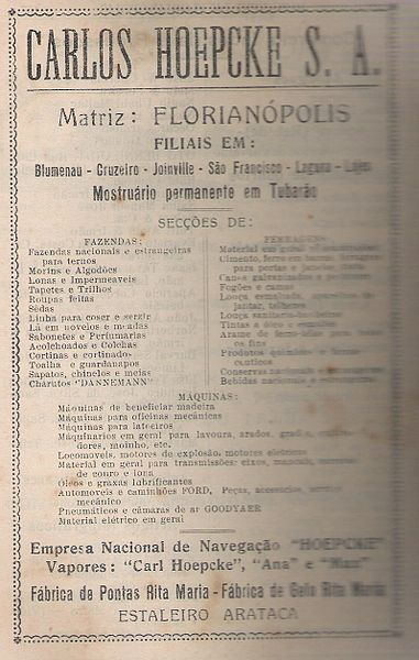 Carlos Hoepcke S.A. Inserção comercial no Guia do estado de S. Catharina, 1941